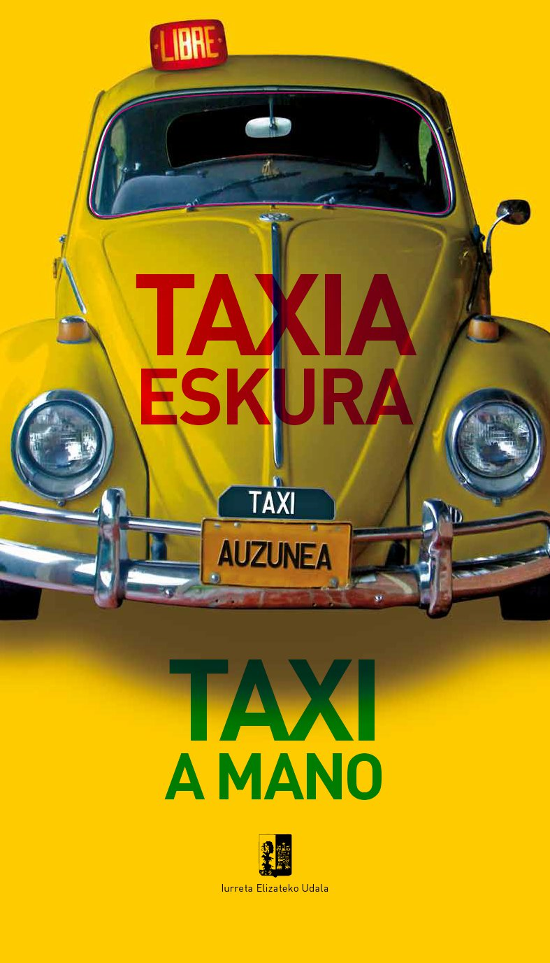 Taxi-auzunea proiektuaren irudia